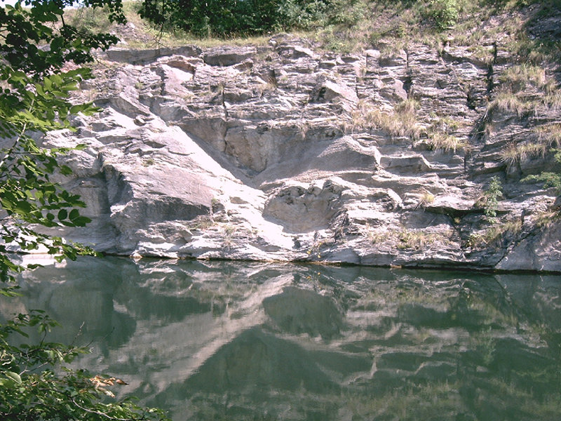 Die Wildenfelser Steinbrüche im Sommer 2005